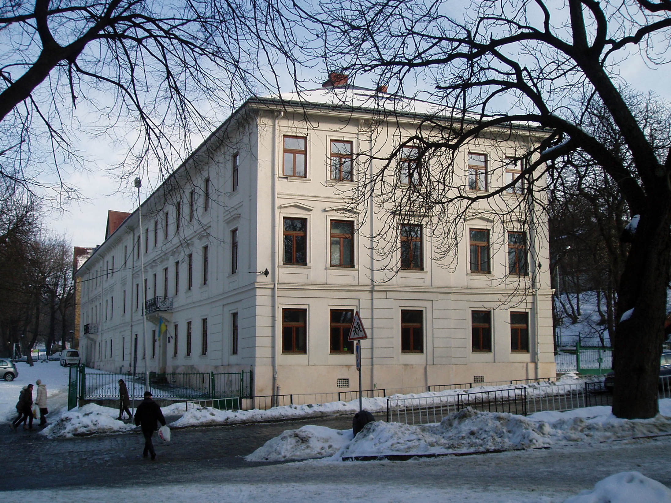 Школа № 8 у Львові. Збудована на початку 19 ст.